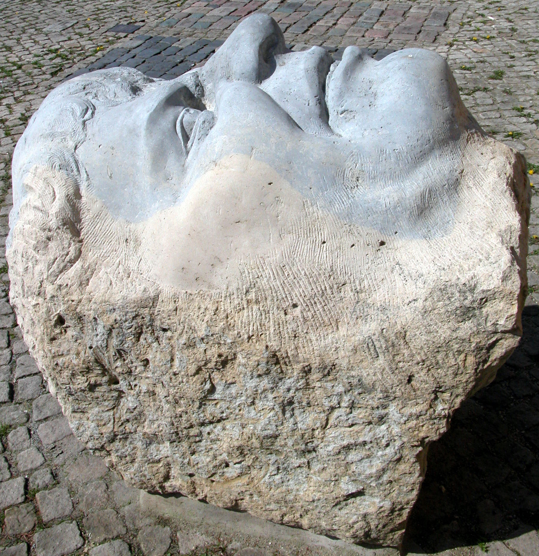 Braunschweig: Kunstwerk, Südseite der Martinikirche.